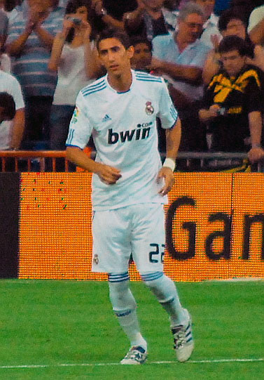 Trofeo Santiago Bernabeu 2010 Real Madrid 2 - Peñarol 0